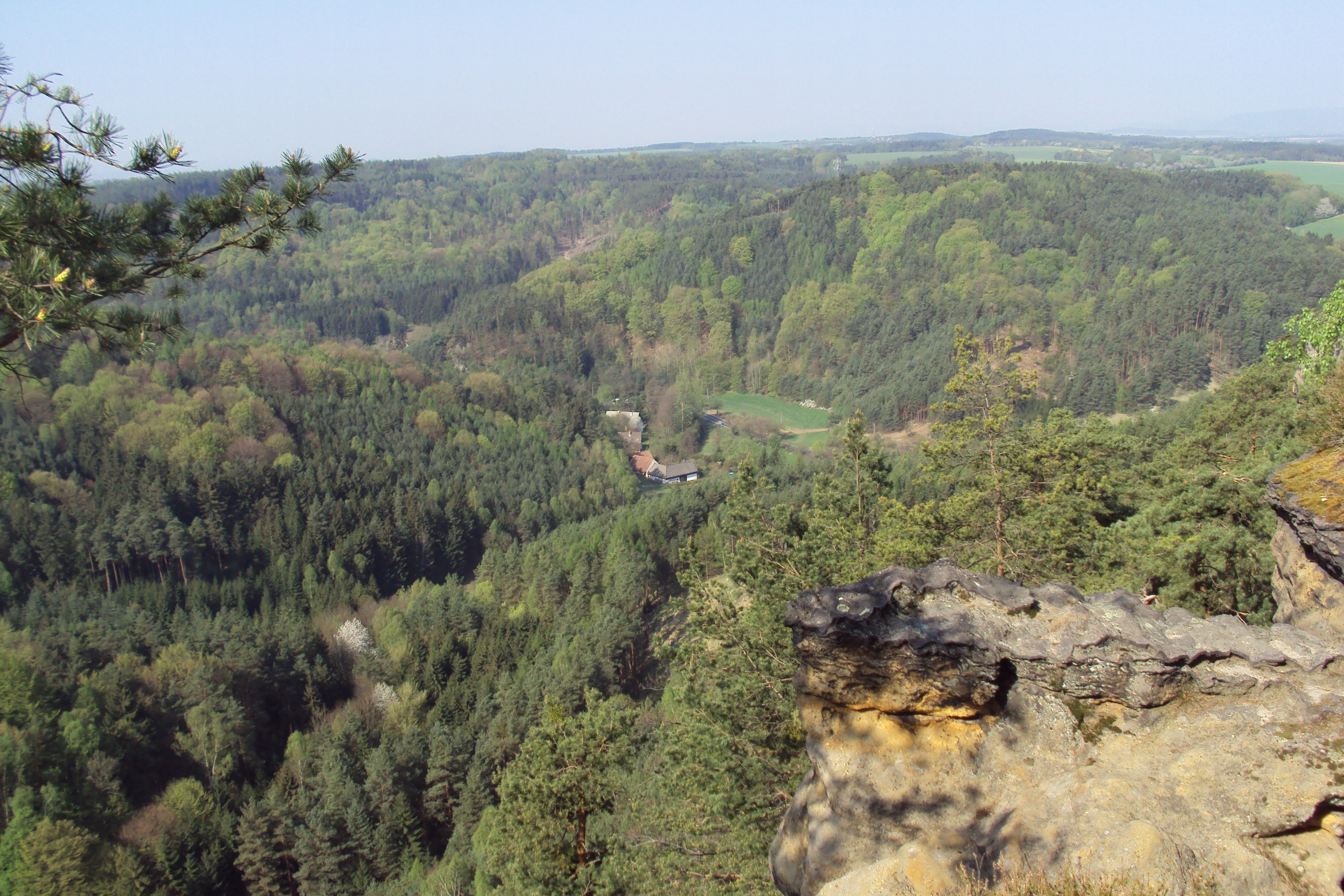 Vyhlídka z okraje kopce Rač směrem na západ, katastr Deštná u Dubé, Kokořínsko